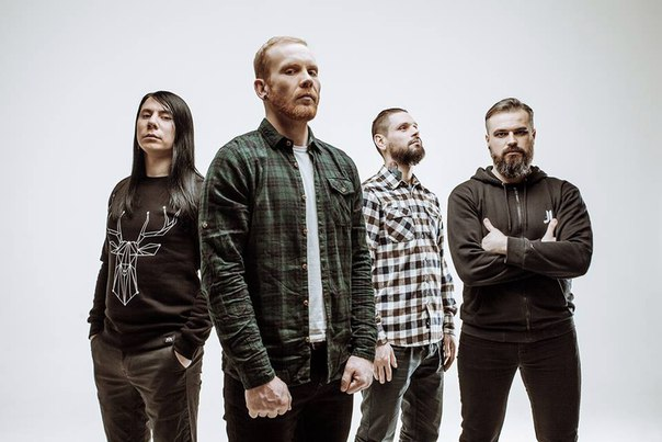 Official band photosession 2016